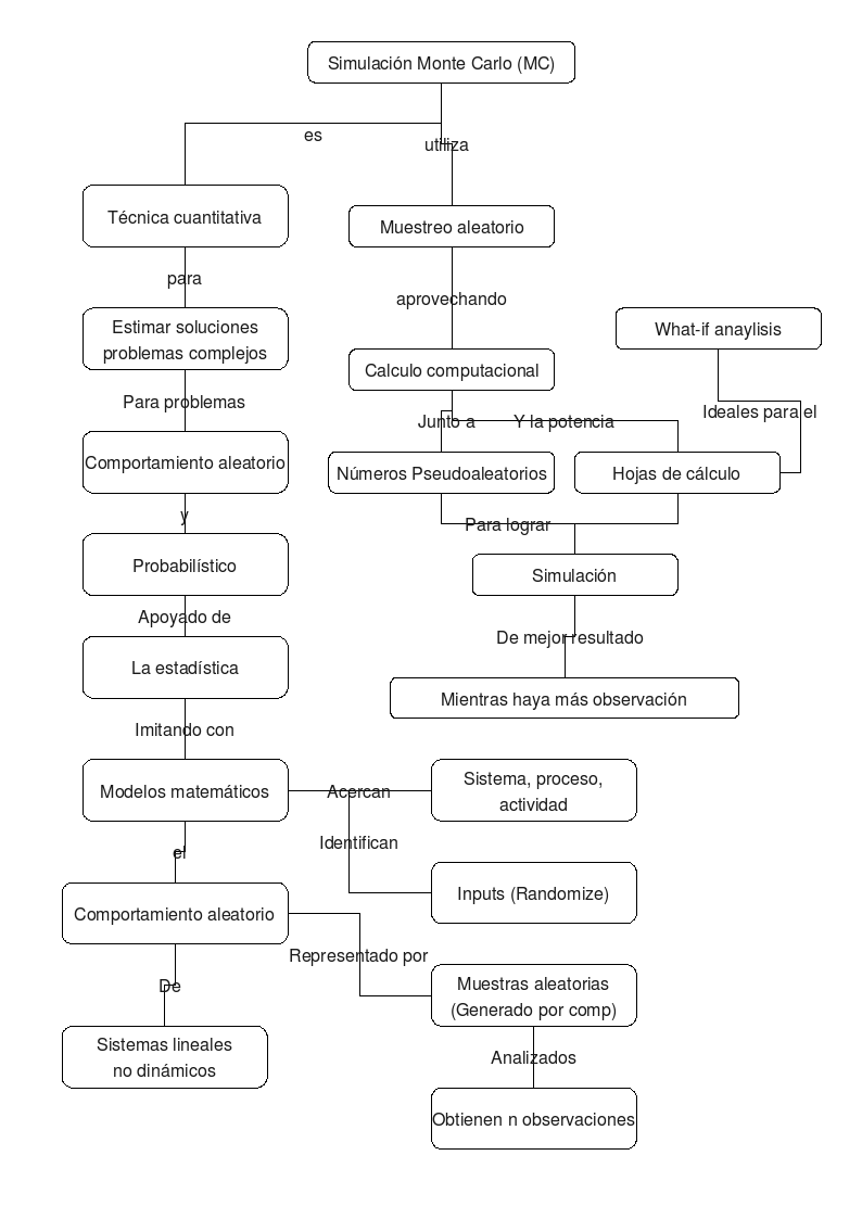 mapa conceptual monte carlo